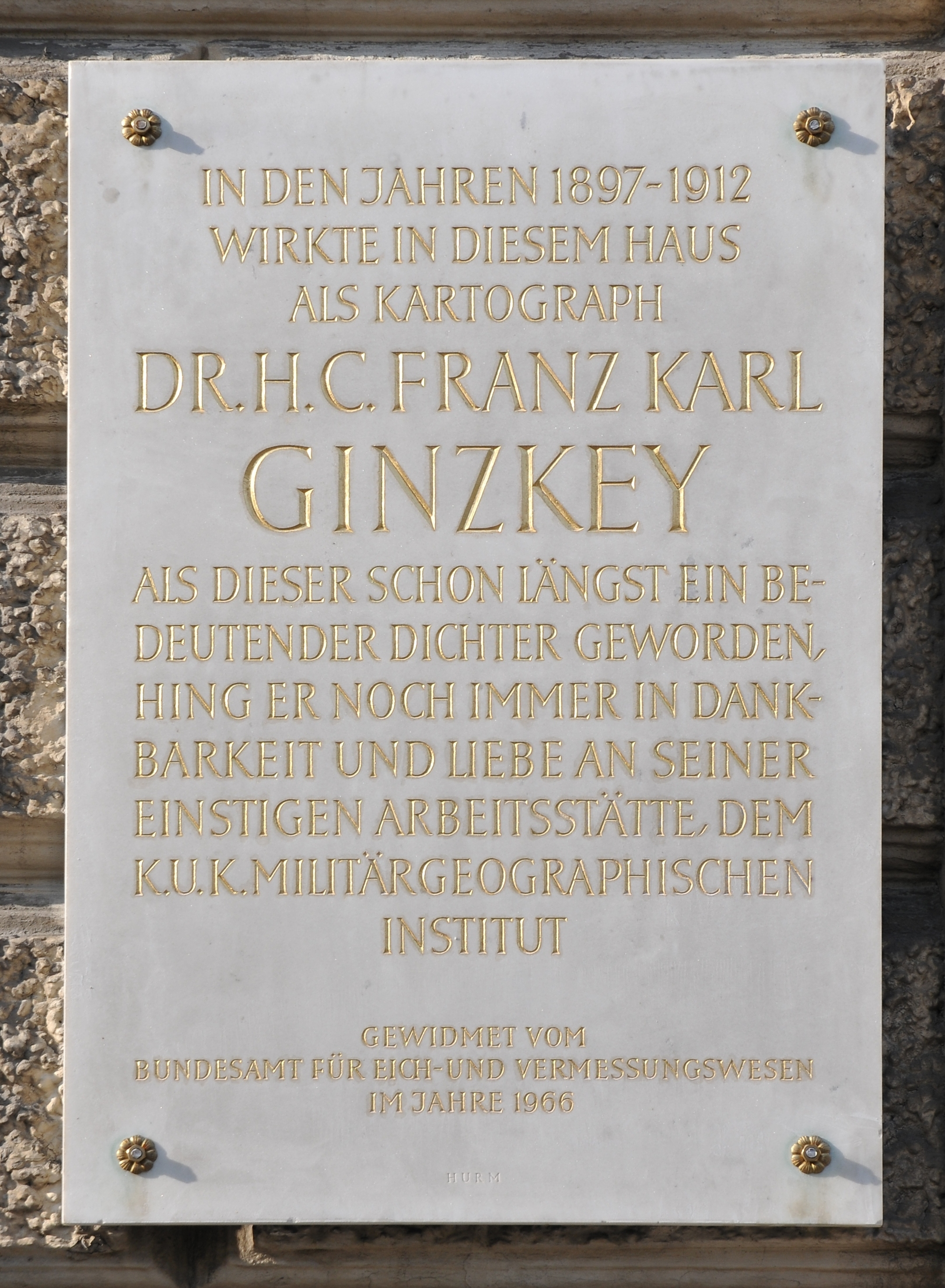 Gedenktafel für Franz Karl Ginzkey am Ehemaligen Militärgeographischen Institut am Friedrich-Schmidt-Platz 3, in Wien-Josefstadt.